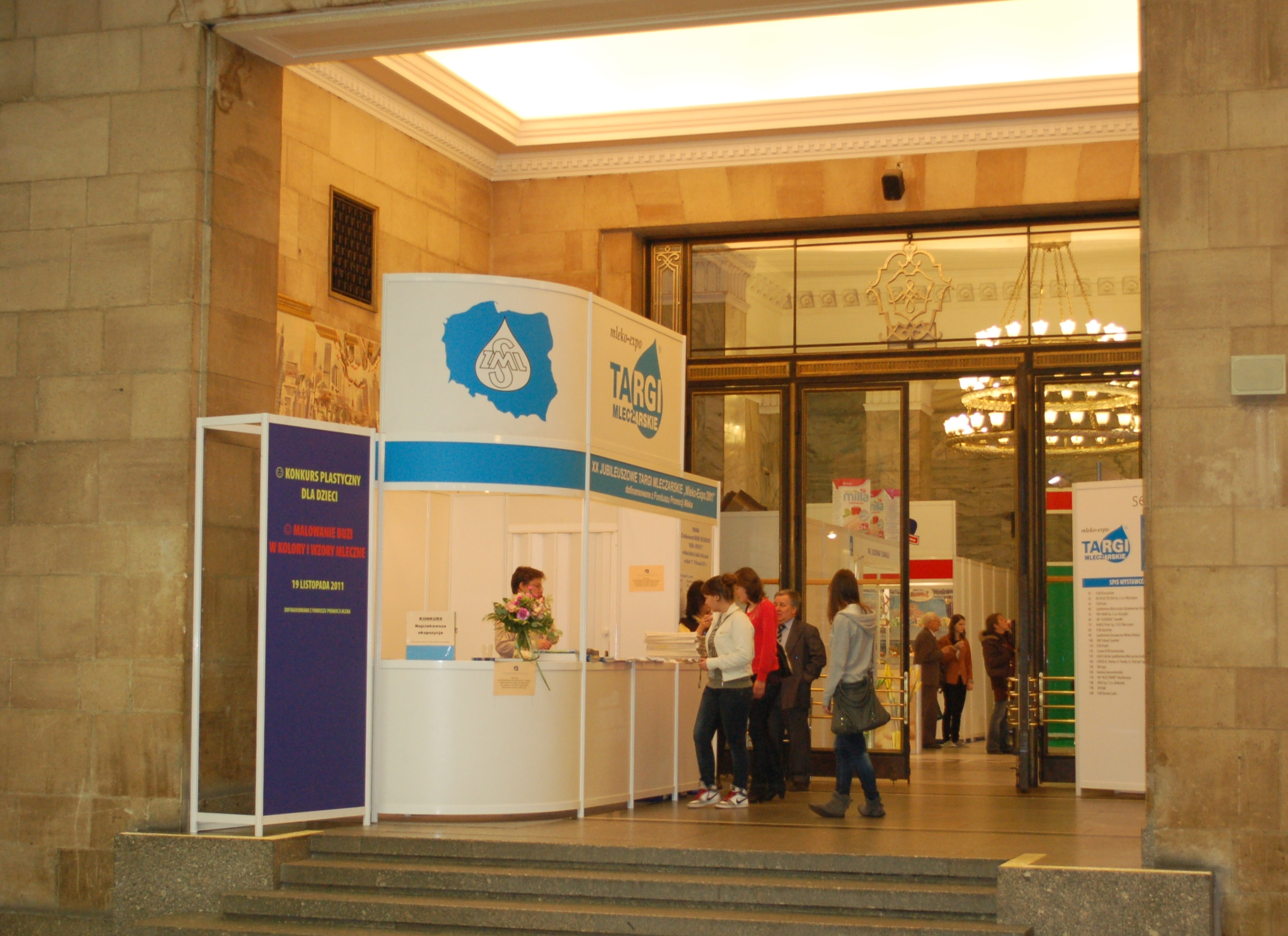 Warsaw